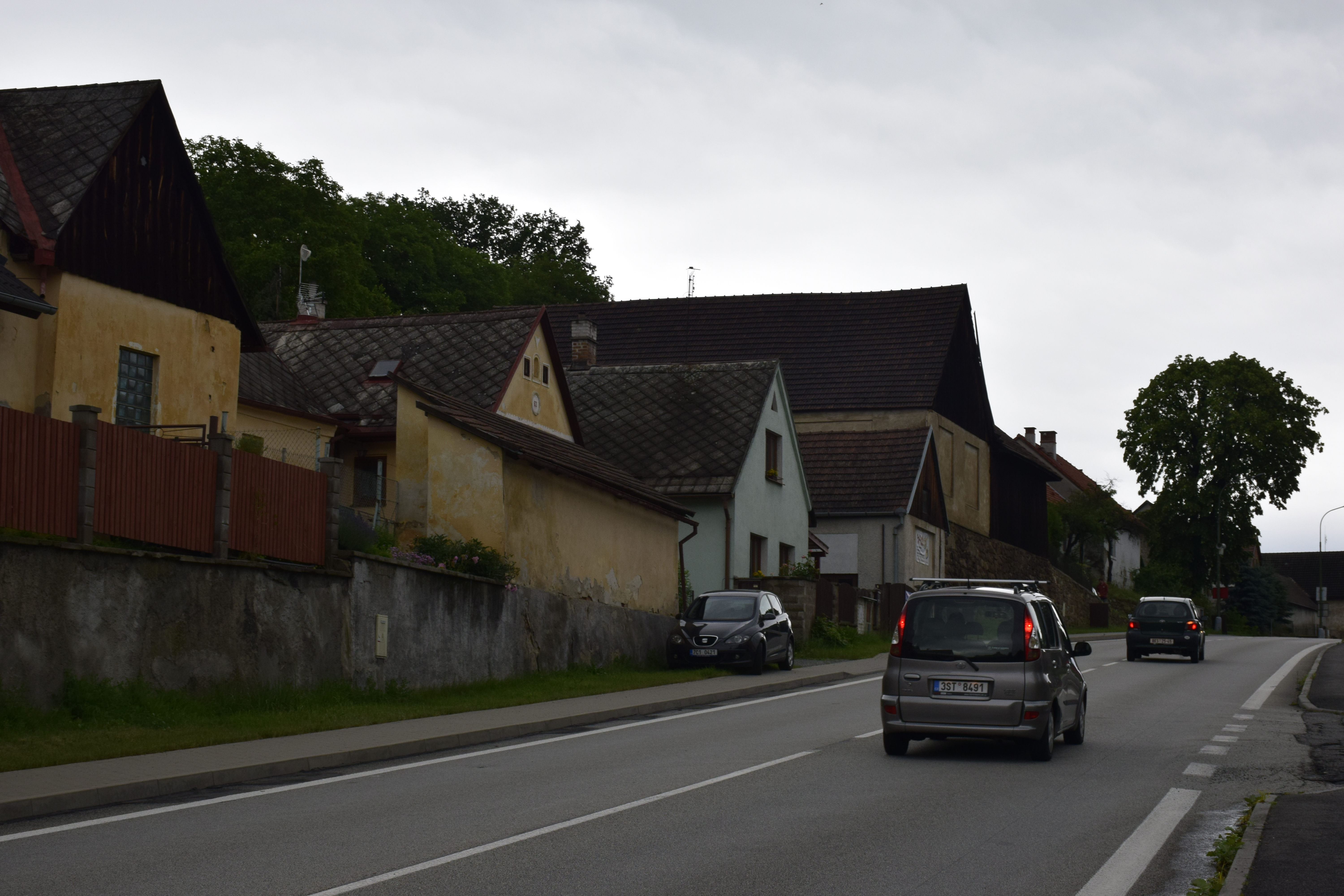 Dražice, Česká republika.